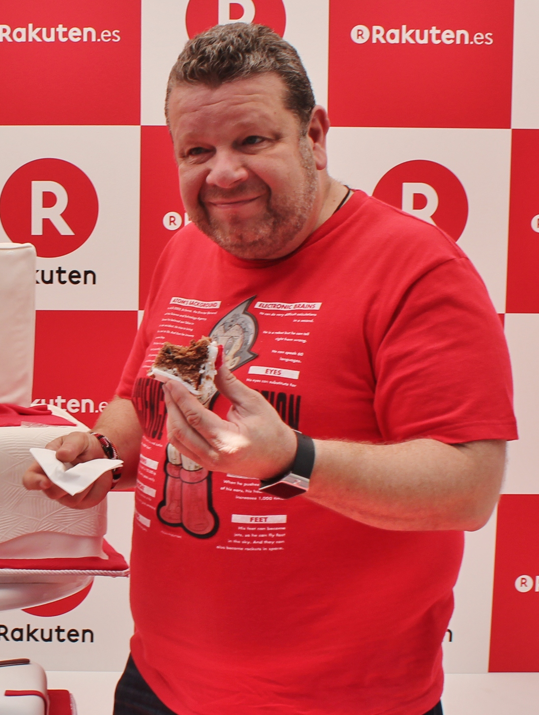 RakutenBolsa